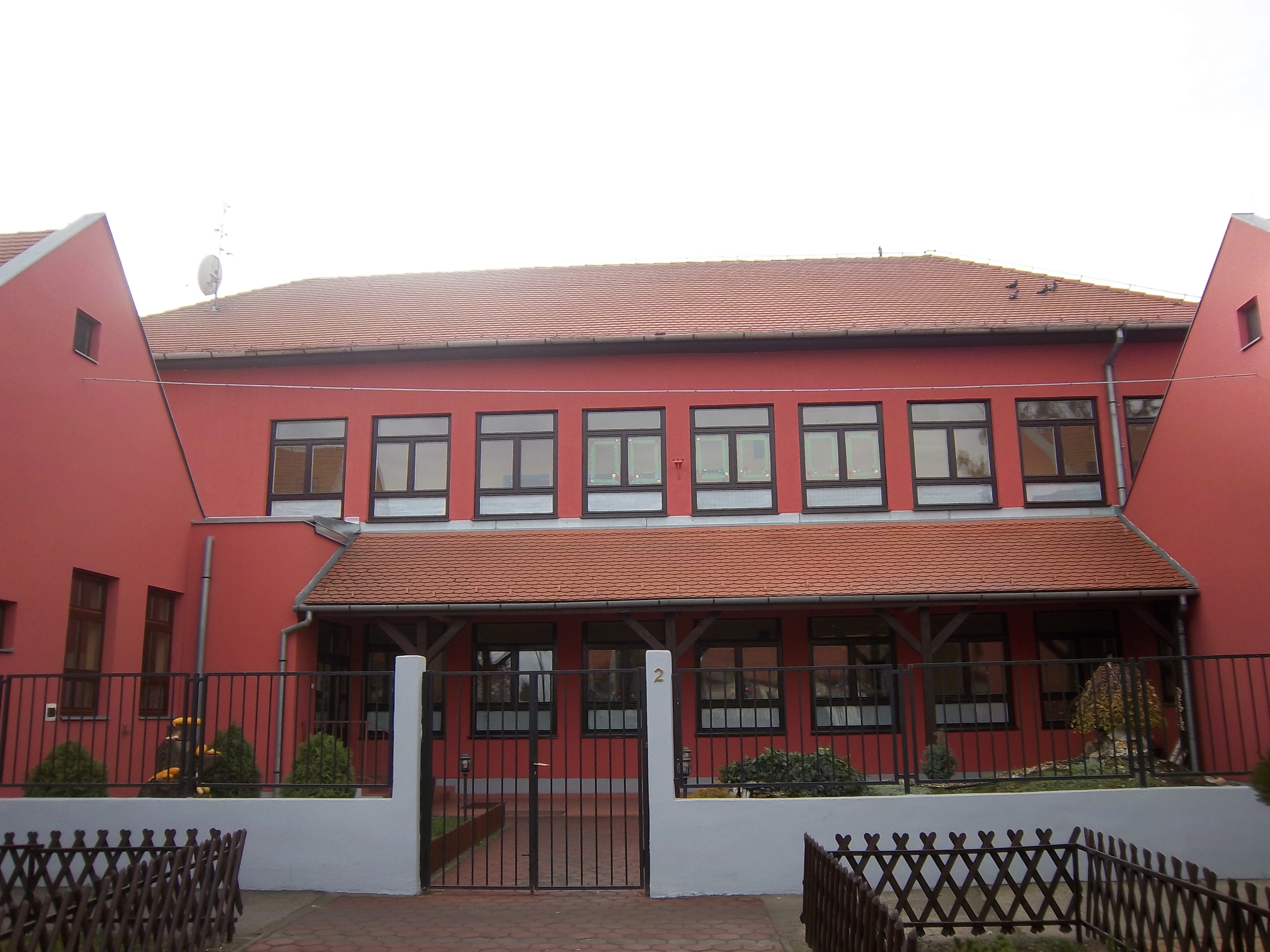 Osnovna škola Trpinja.